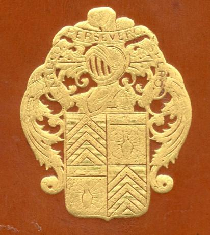 armoiries des Pavée de Vendeuvre figurant sur un livre de leur bibliothèque